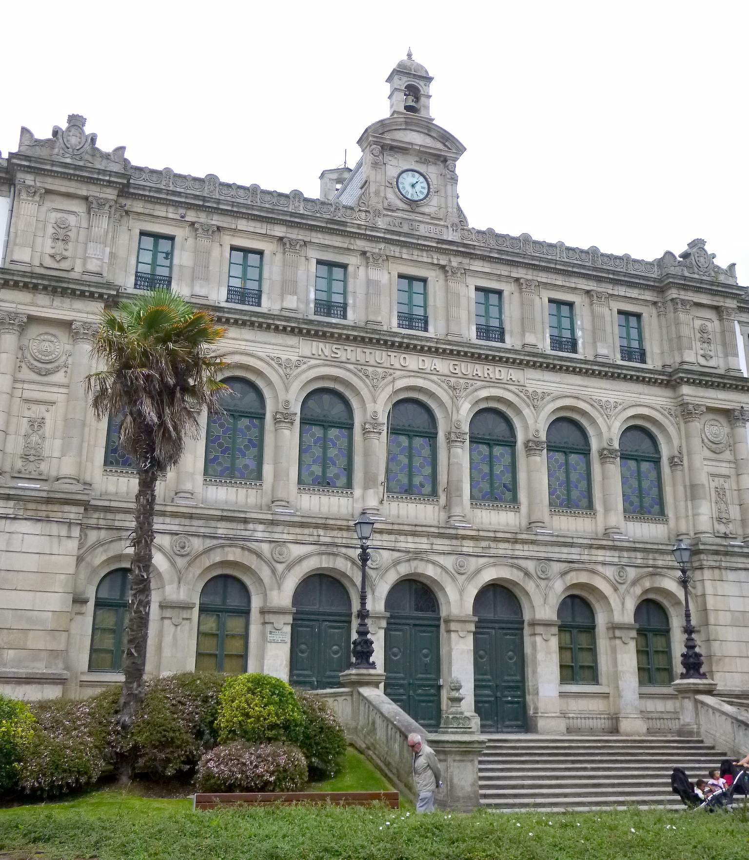 A Coruña - Plaza de Pontevedra - Instituto Eusebio da Guarda